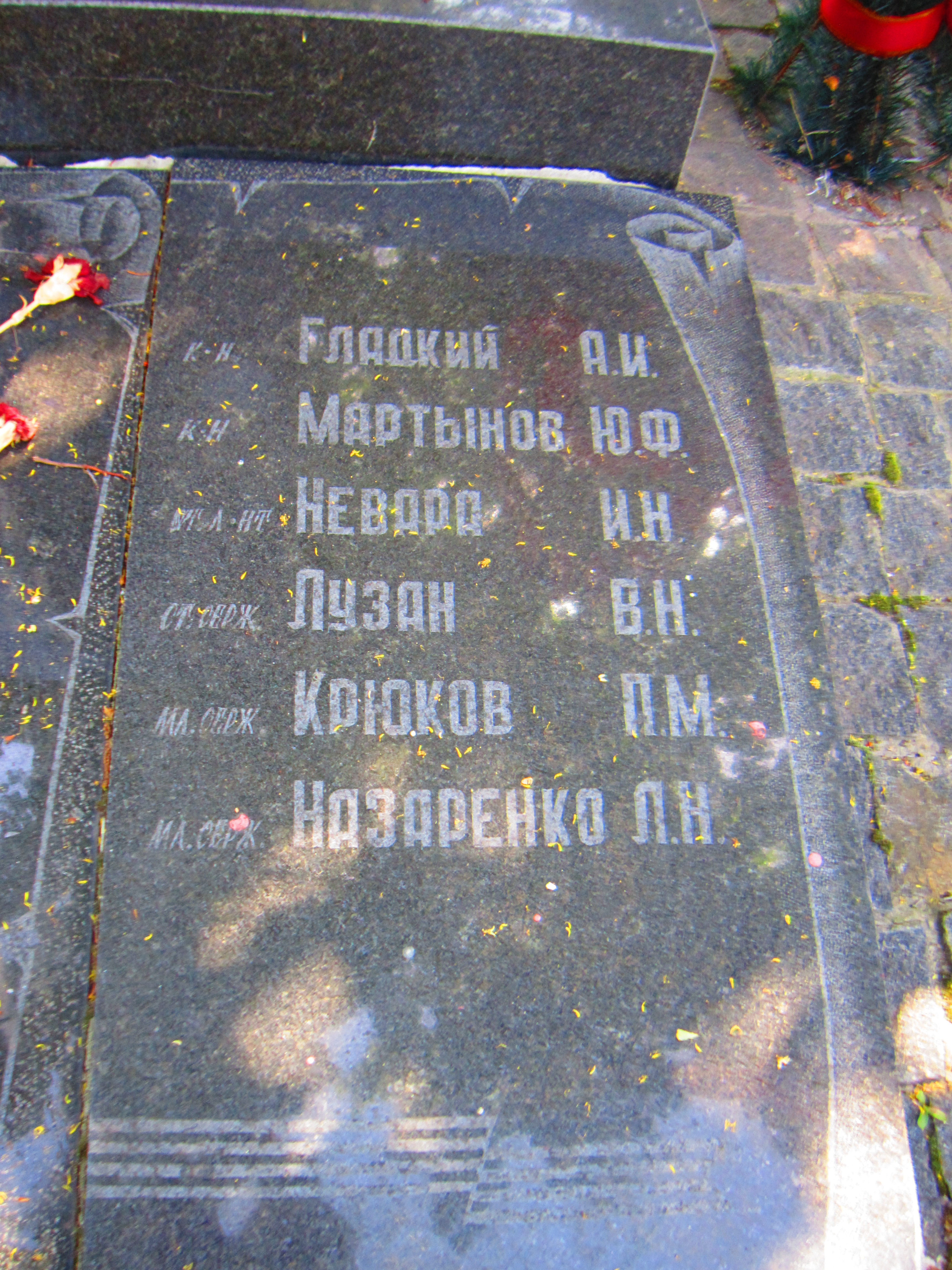 Вікіекспедиція до Великобурлуцької громади. Великий Бурлук, 15 червня 2019 року.Пам'ятний знак воїнам-інтернаціоналістам на Меморіальному комплексі Слави, розташоване біля Центрального кладовища, на Осіянській горі.